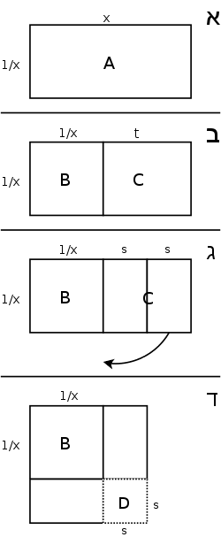 תרשים שמראה תהליך של השלמה לריבוע, מעשה ידי בעזרת התוכנה dia.